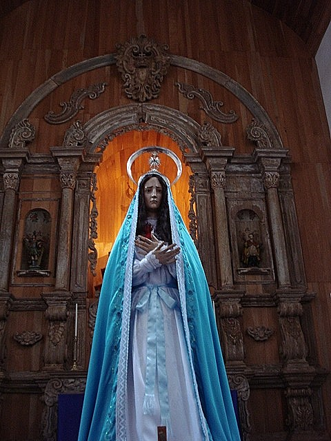 Nossa Senhora das Dores, na Igreja Matriz de Nossa Senhora do Rosário de Pirenópolis